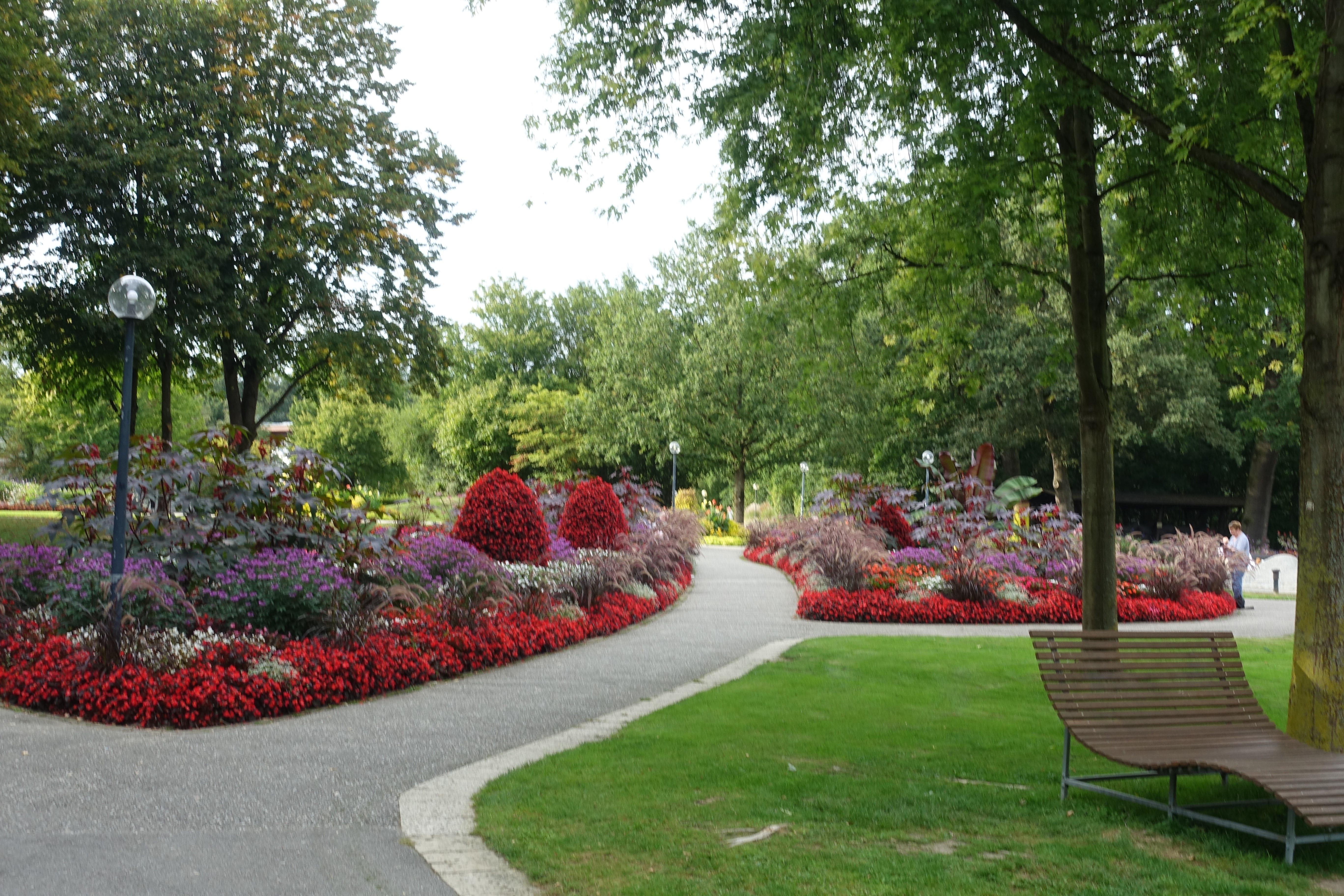 Kurpark Bad Füssing (2019)